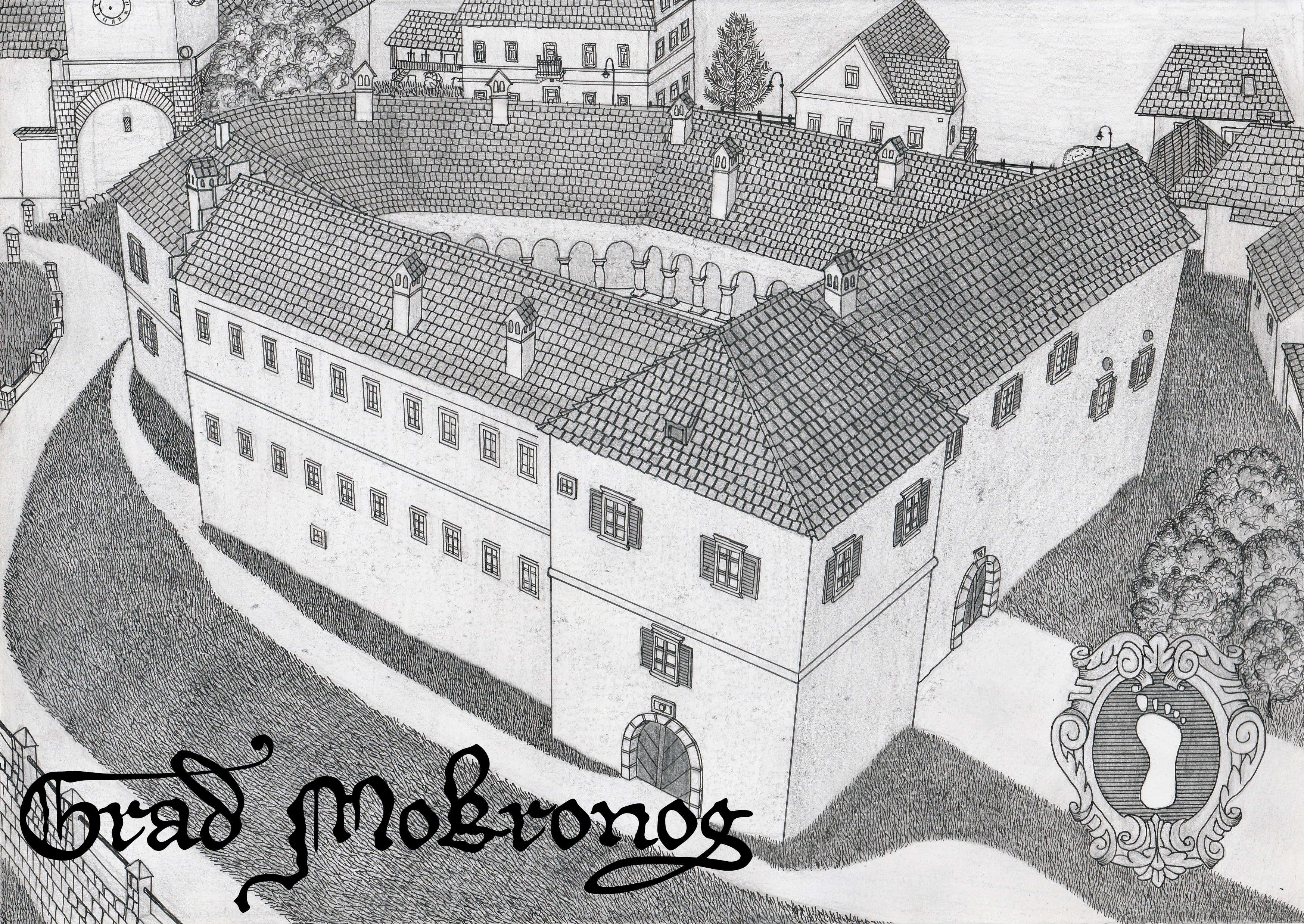 Poskus rekonstrukcije trškega gradu Mokronog malo pred uničenjem med drugo vojno. Spodaj desno je grb trga Mokronog.